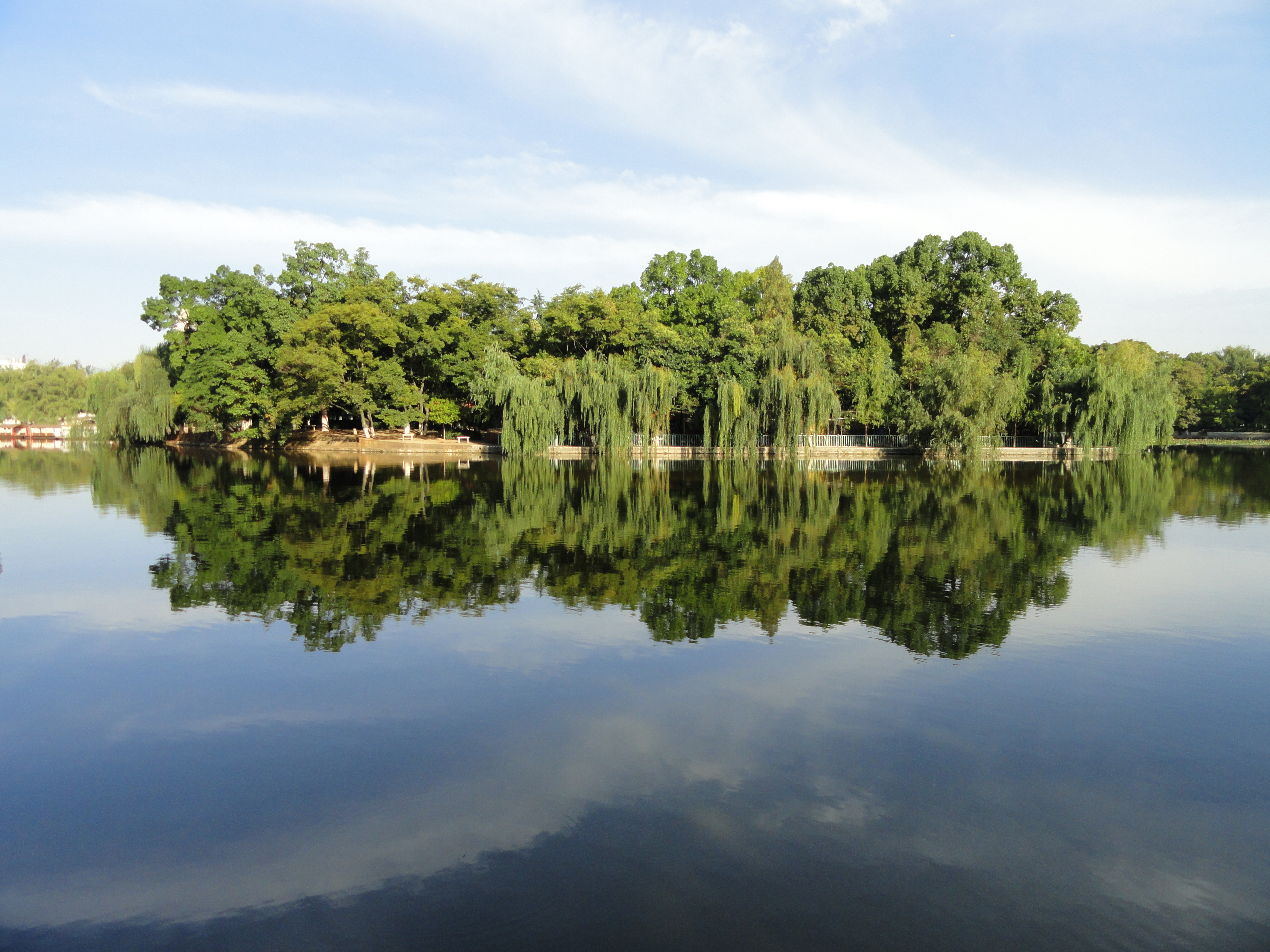 Green Lake Park, Kunming, Yunnan, China.